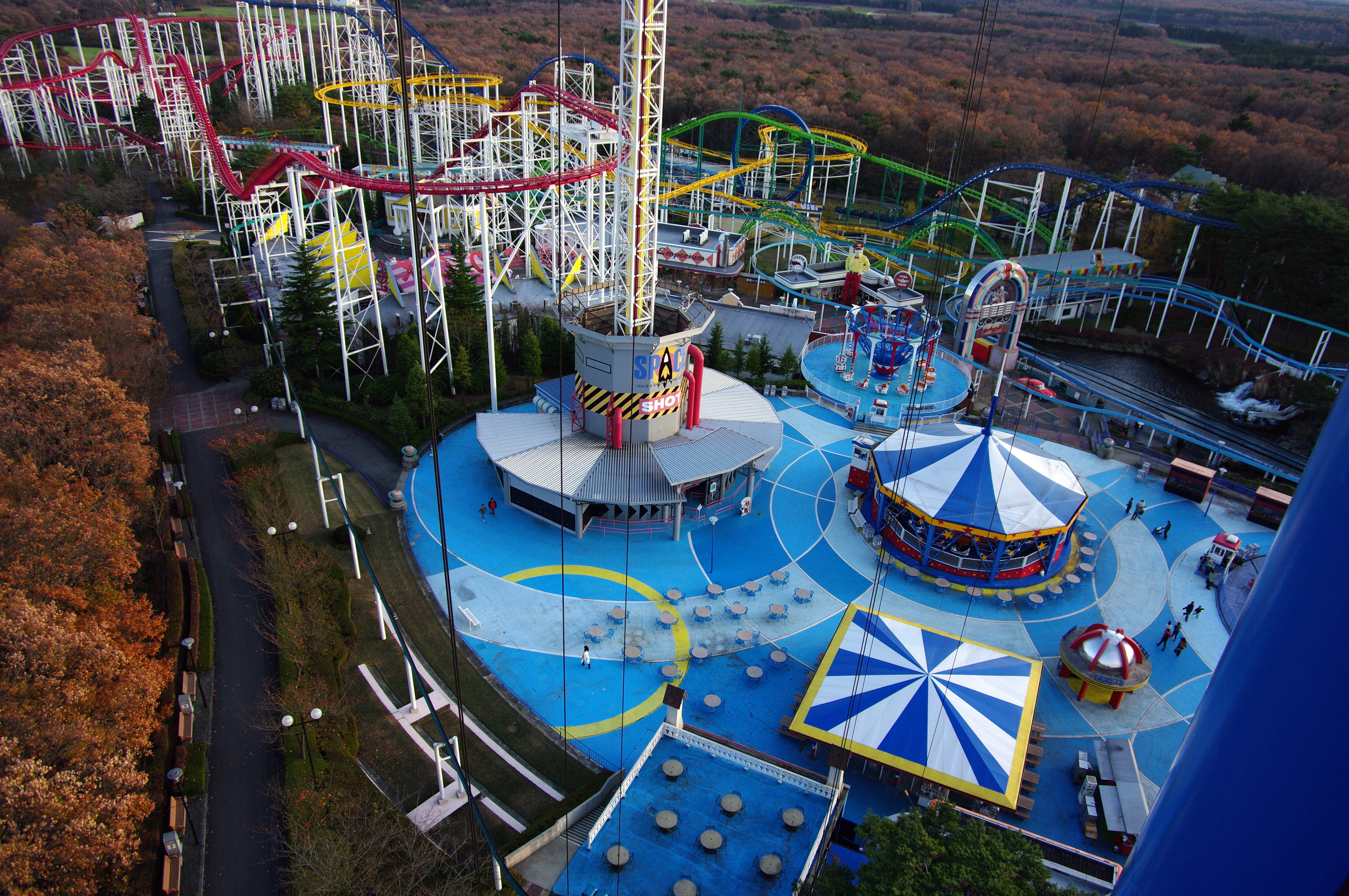 那須ハイランドパーク全景